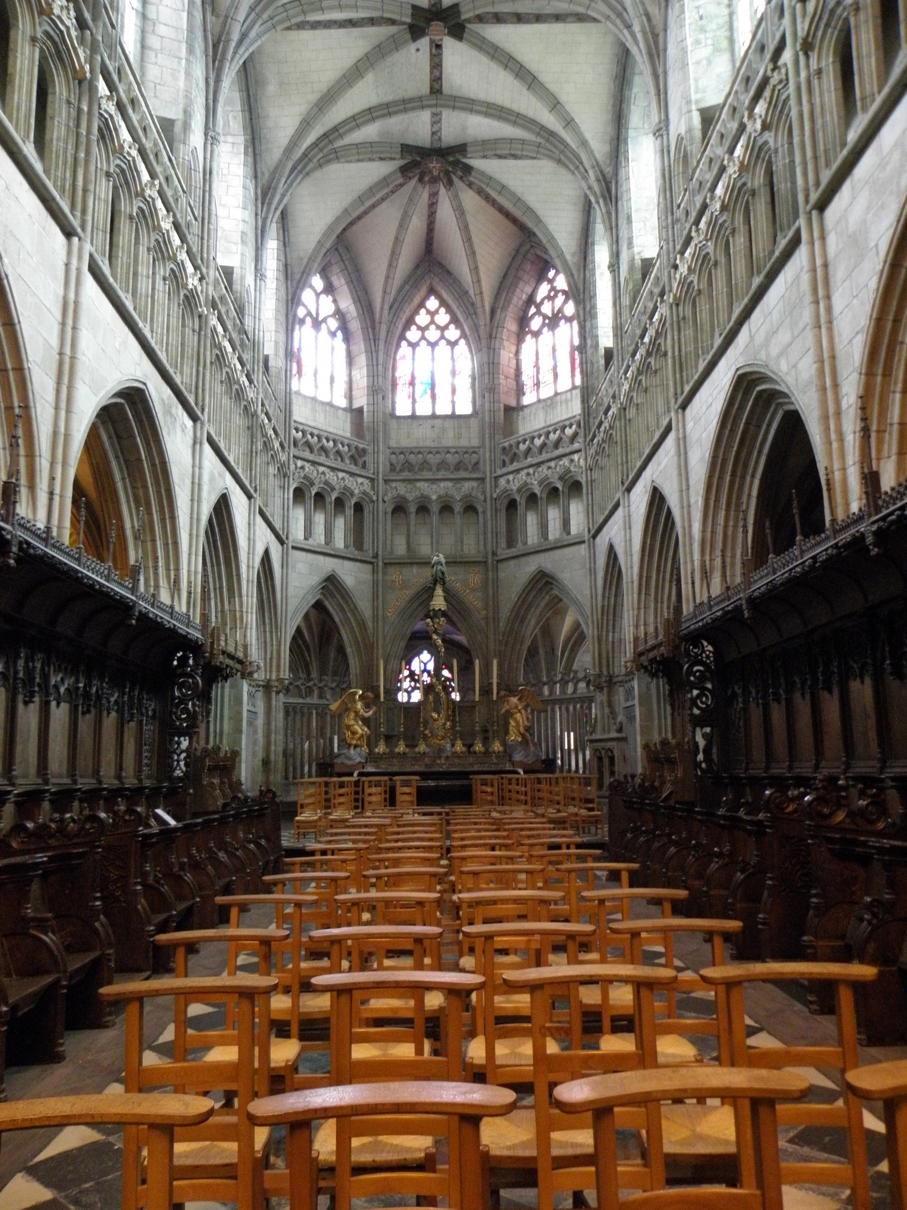 Chœur de la cathédrale Saint-Paul-Aurélien de Saint-Pol-de-Léon (29). .